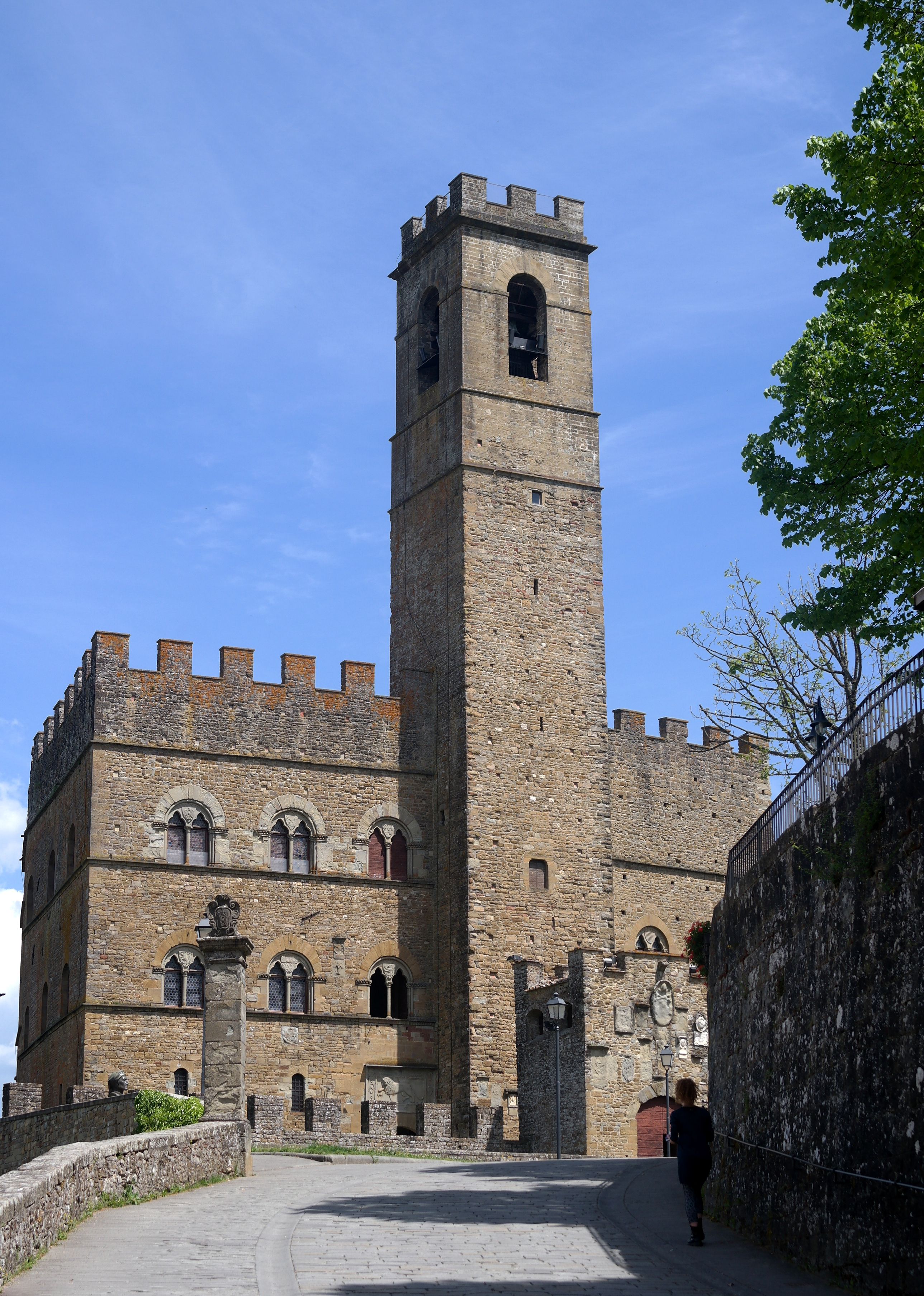 Castello dei Conti Guidi a Poppi